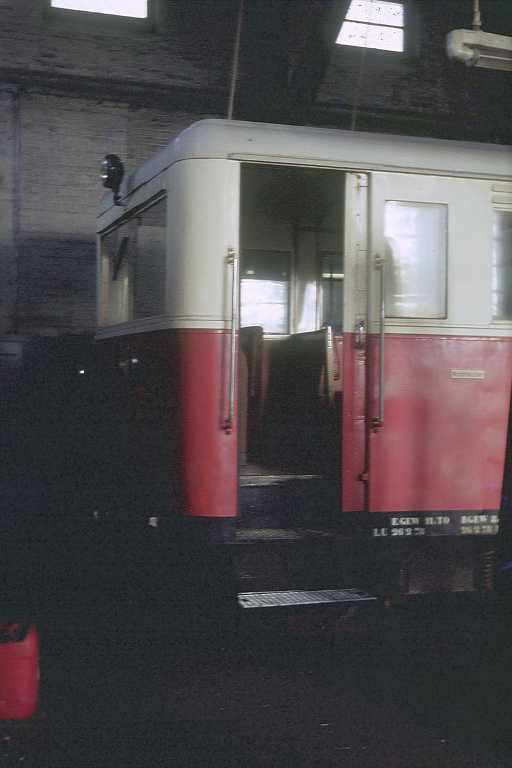 699 001 * Quelle: selbst fotografiert 1983 Wangerooge, Archiv-Nr. 29/3 * Fotograf: Benedikt Dohmen, User:Benedictus * Copyright Status: GNU Freie Dokumentationslizenz